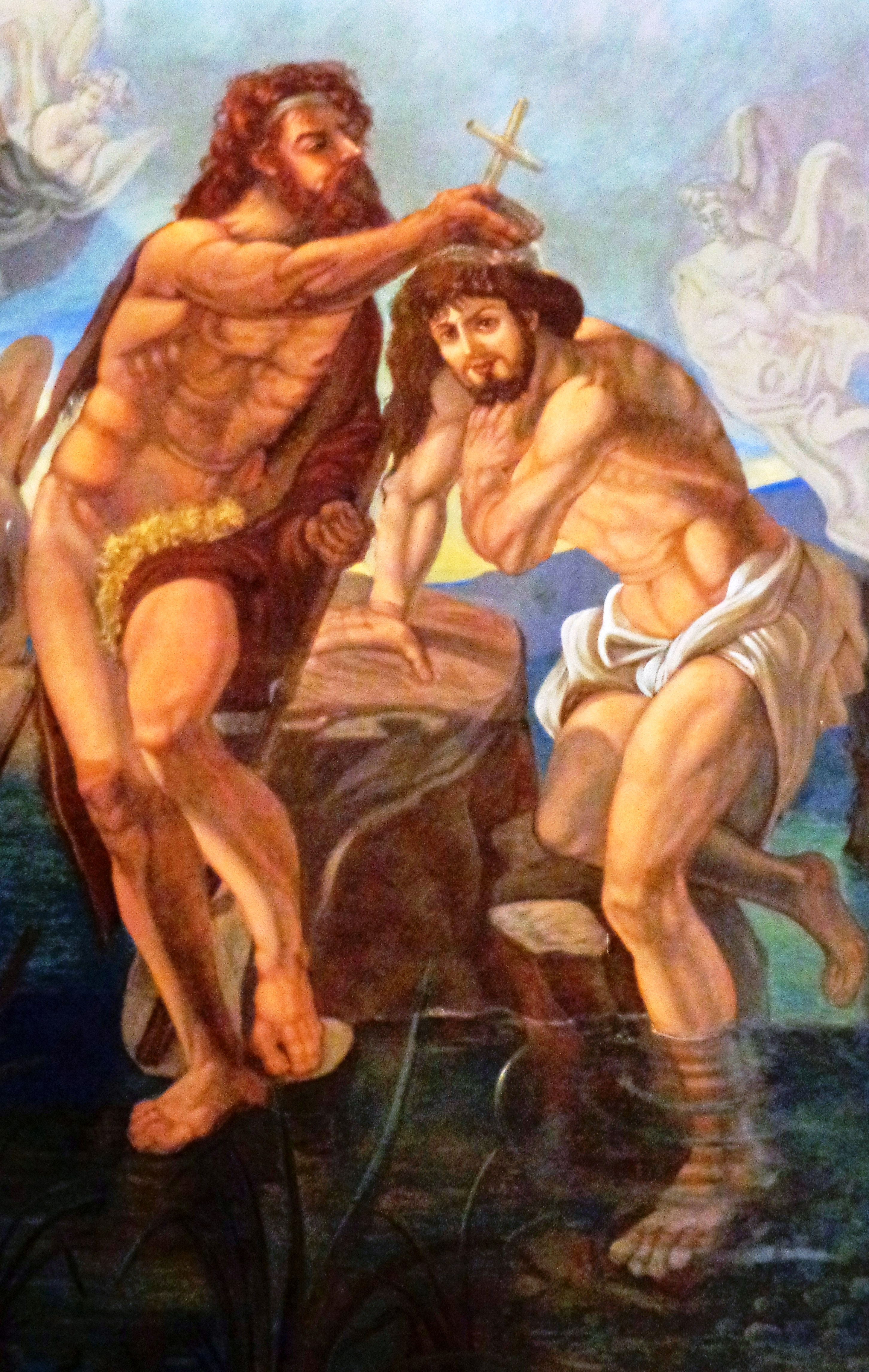 Affresco Basilica di San Sebastiano Barcellona Pozzo di Gotto.